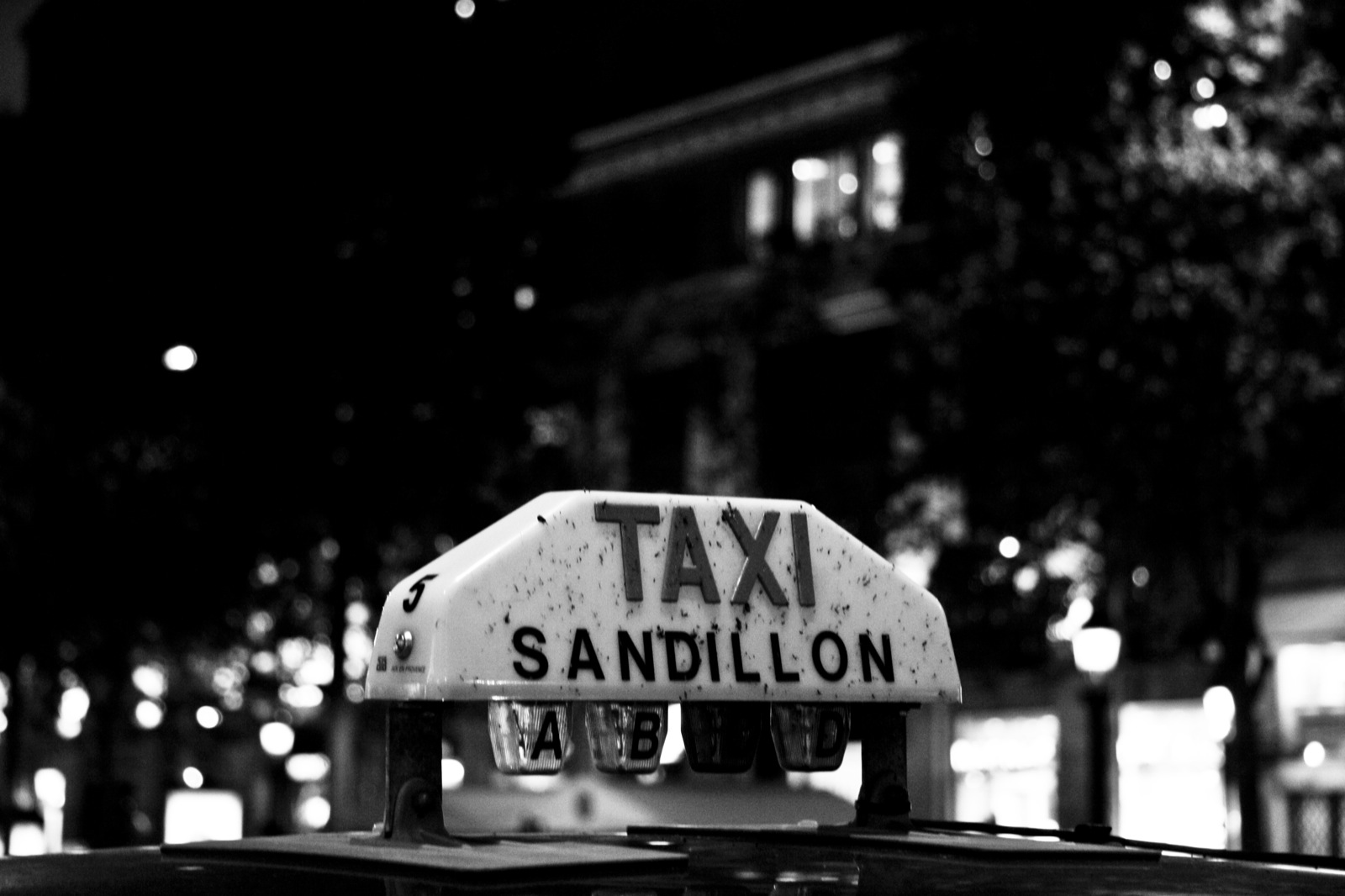 Taxi at Champs Elysées